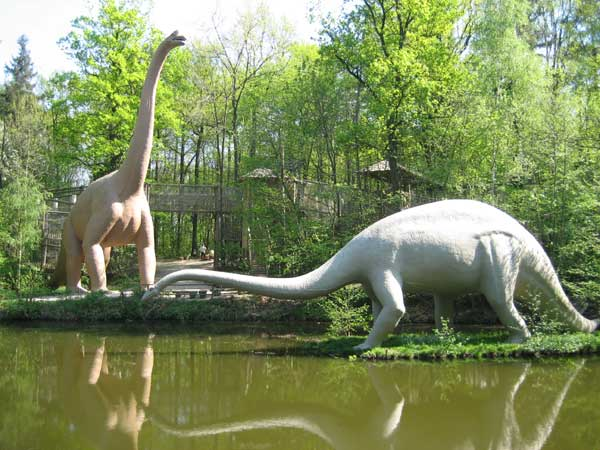 Brachio-Saurus und Diplodocus im Saurierpark